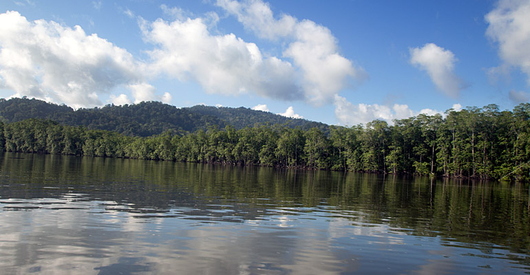 Sierpe River mangroves